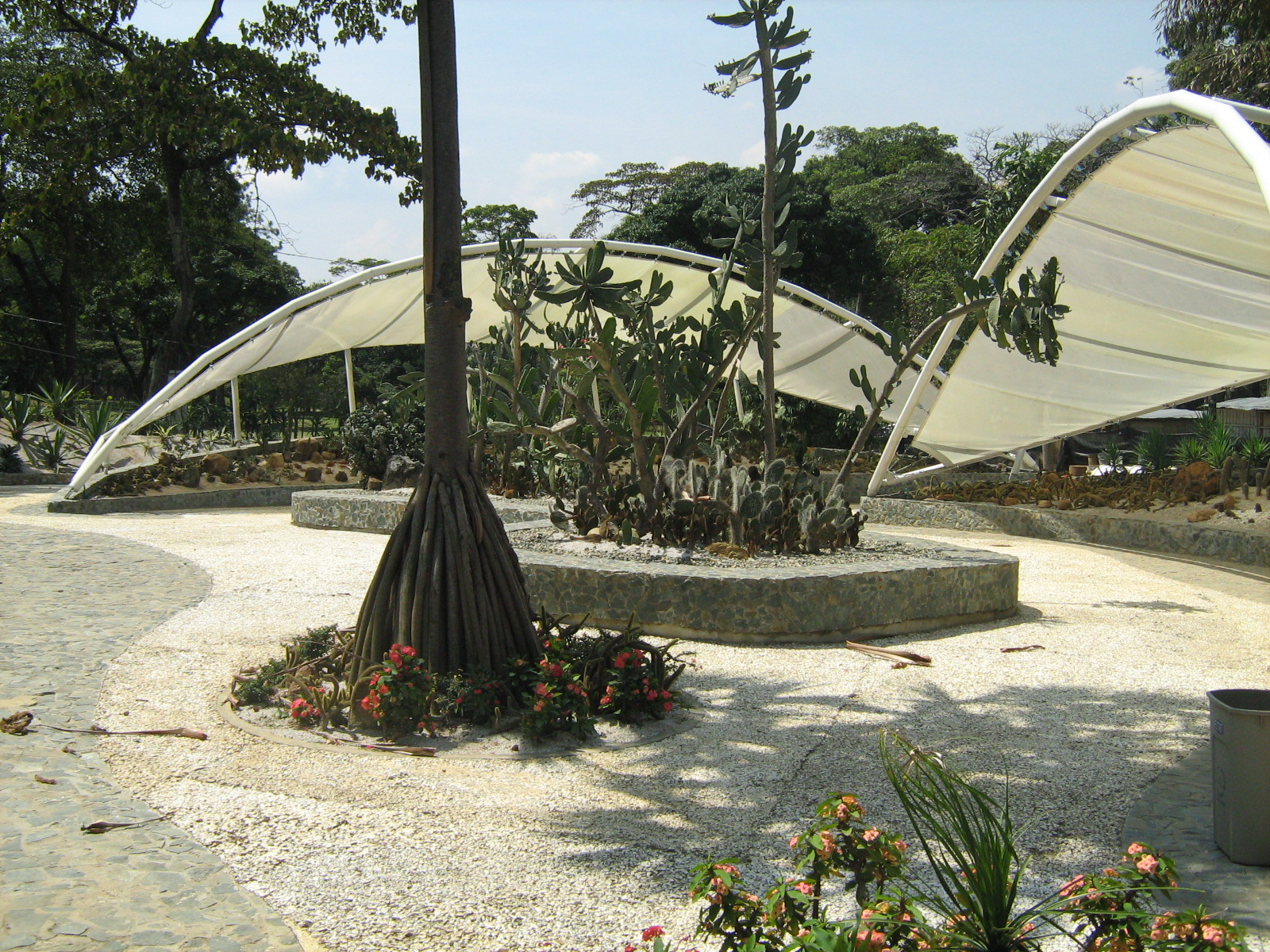 Jardín del desierto en el Jardín Botánico de Medellín, Colombia